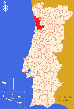 Área Metropolitana do PortoÆnglisc: Porto Metropolitan Area